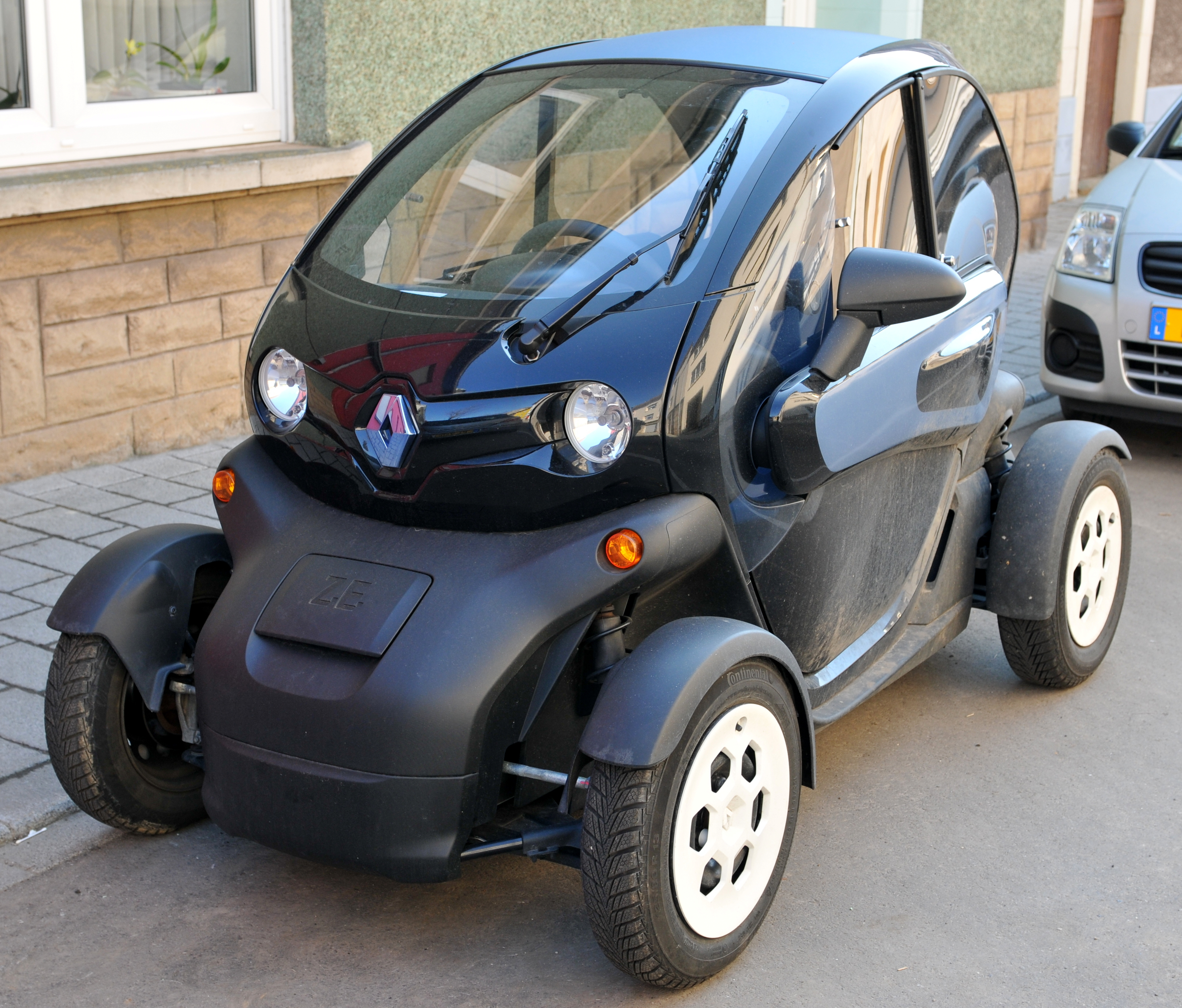 Eng Renault Twizy Z.E. zu Diddeleng.